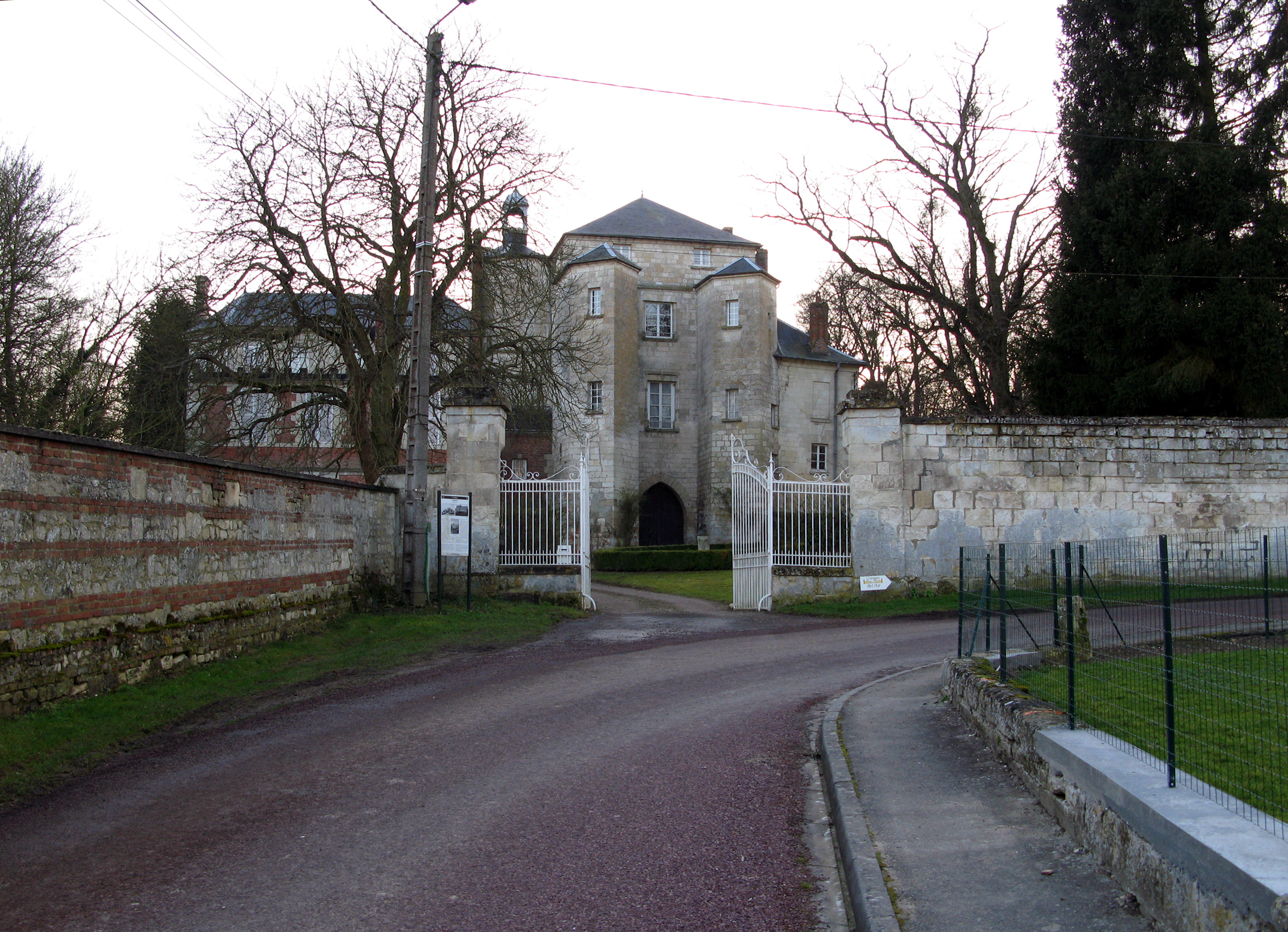 La Faloise (Somme, France) - Le château, aperçu en montant la rue (depuis les environs de l'église). . .